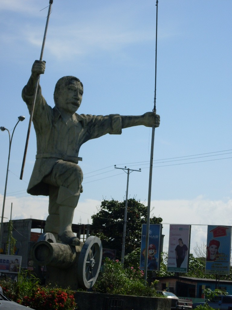 Acarigua, estado Portuguesa - Venezuela (2010)